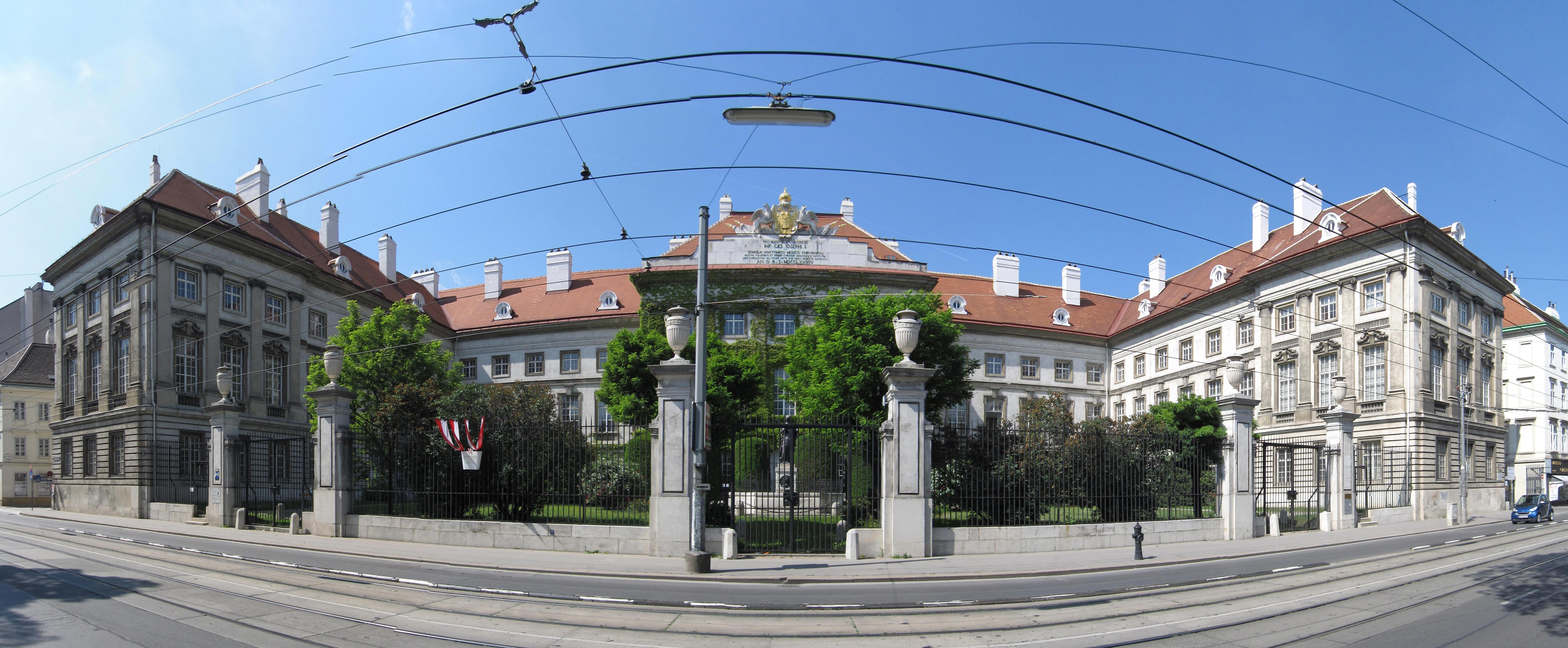 Josephinum in Vienna.